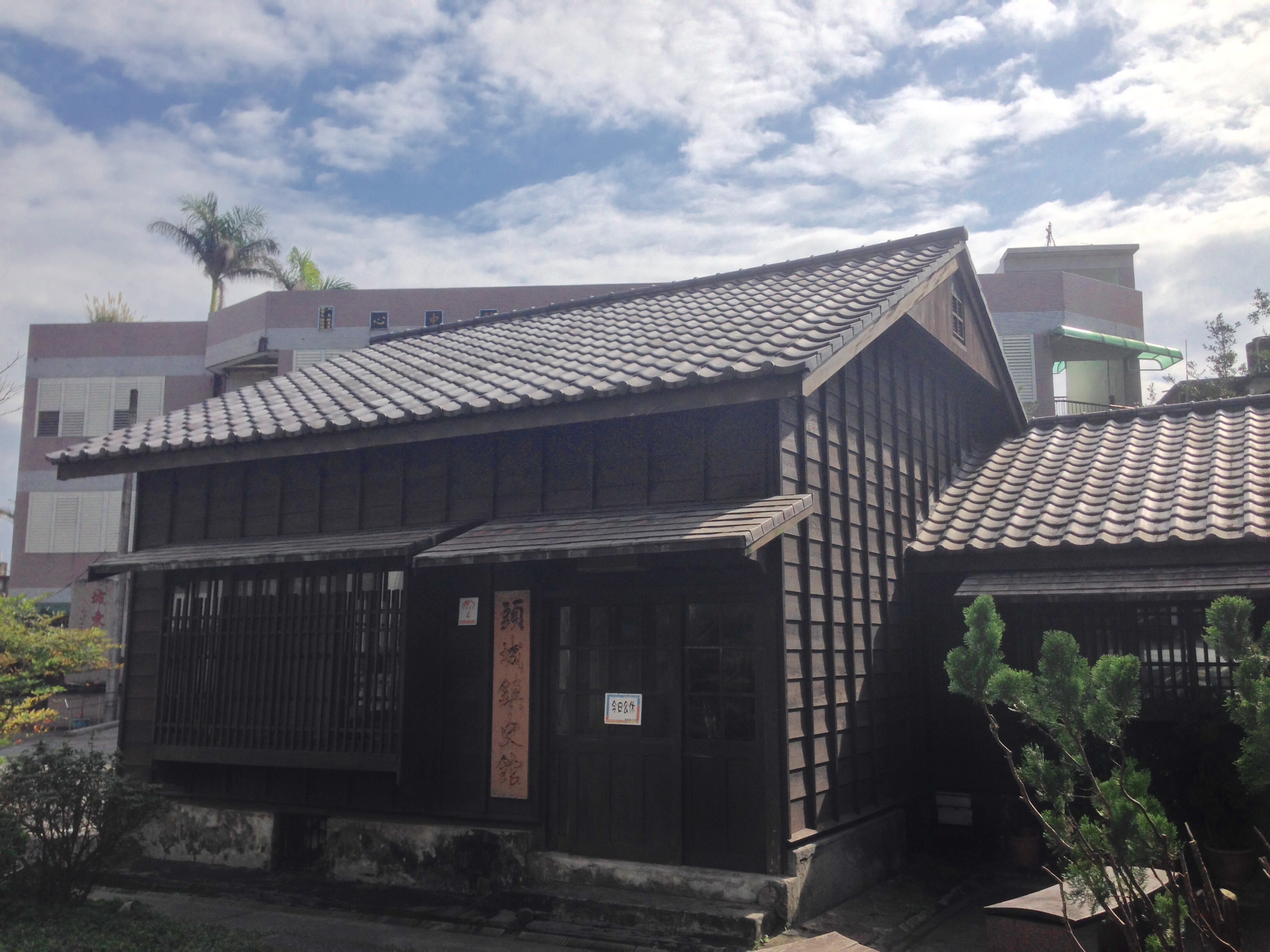 中文（台灣）: 李榮春文學館